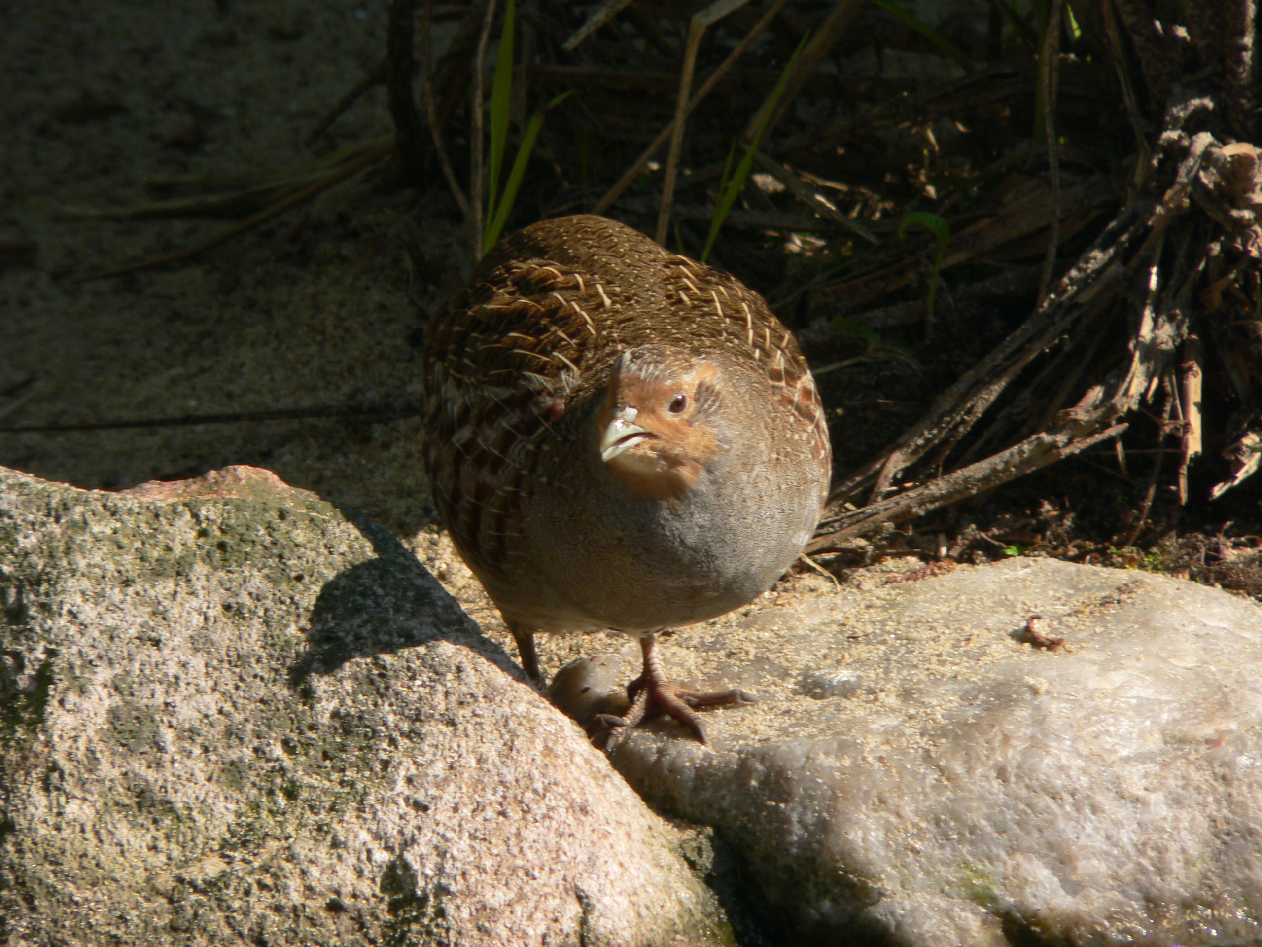 Perdix perdix